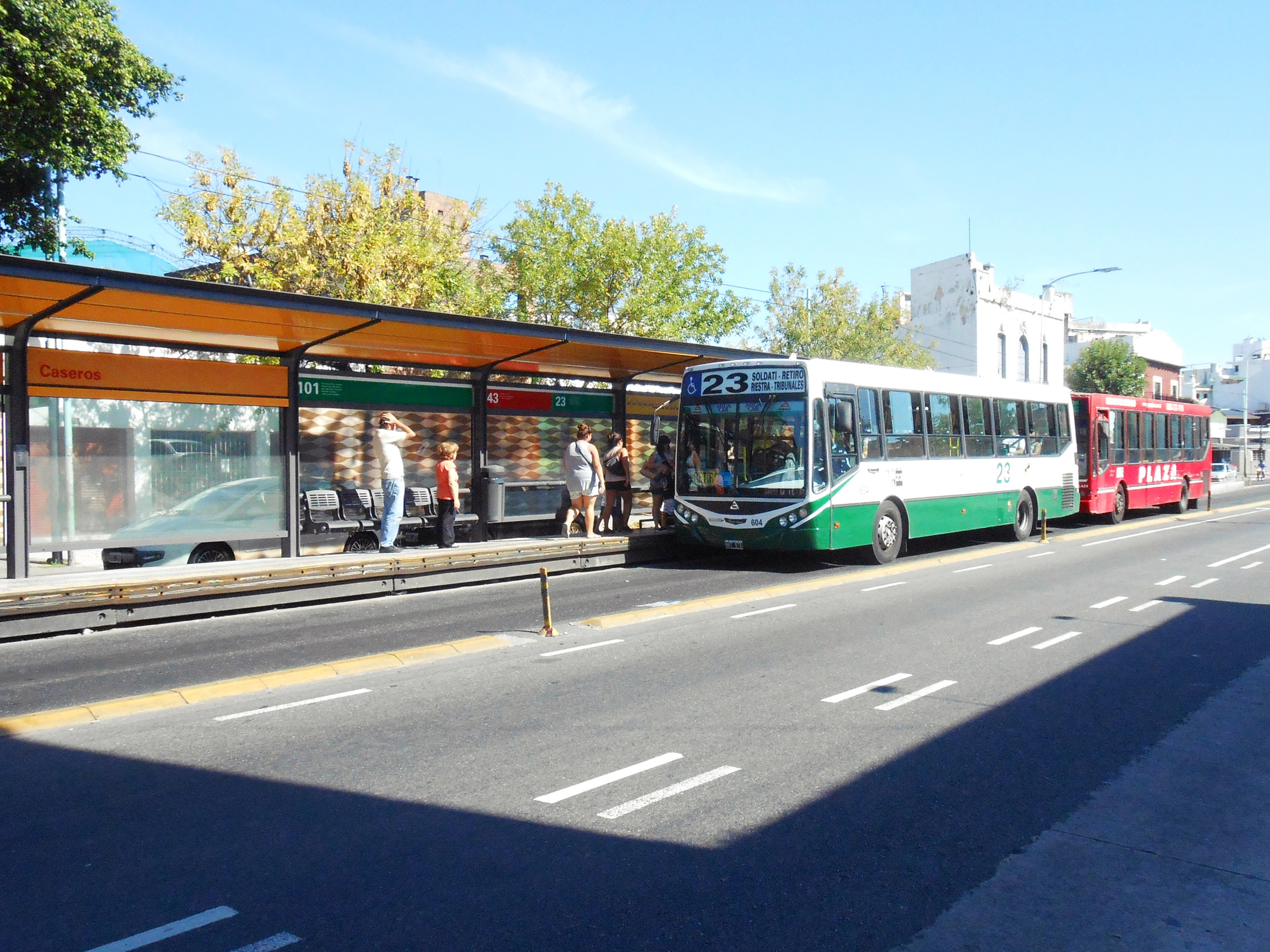 Metrobus Caseros - Buenos Aires - Argentina